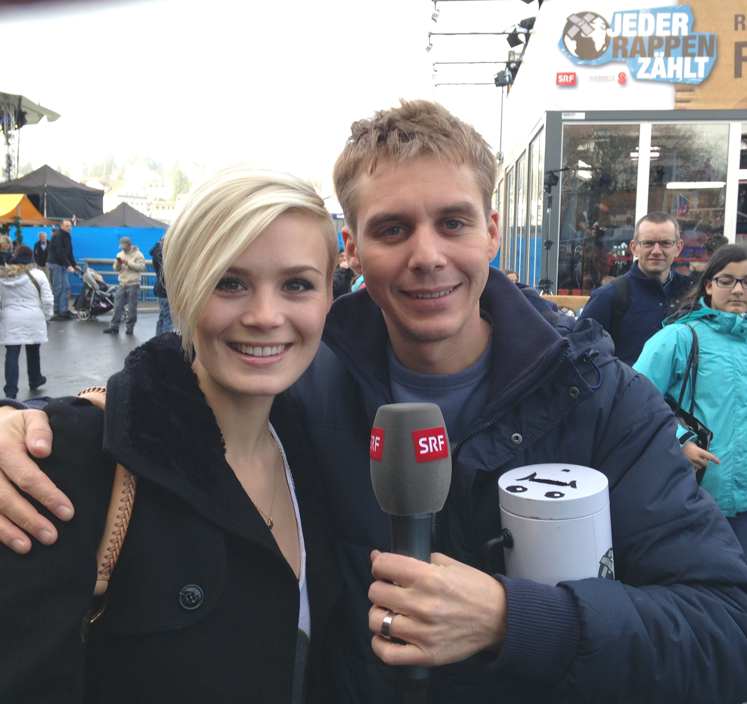 Dominique Rinderknecht, Miss Schweiz 2013, und SRF-Radiomoderator Reto Scherrer beim Spendensammeln für die Aktion "Jeder Rappen zählt" 2014 in Luzern.